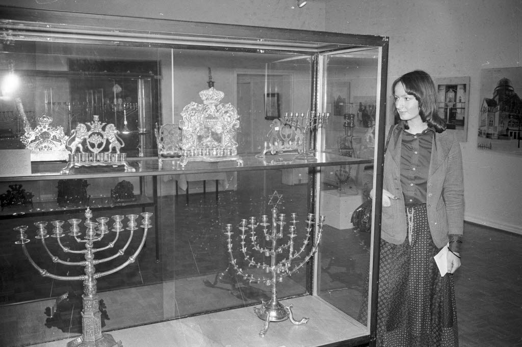 anlässlich der "Woche der Brüderlichkeit 1974". Das Zustandekommen der Ausstellung ist der Gesellschaft für jüdisch-christliche Zusammenarbeit in Schleswig-Holstein und der schleswig-holsteinischen Gesellschaft der Freunde der Hebräischen Universität Jerusalem zu verdanken.